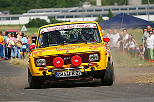 eigenes Bildmaterial